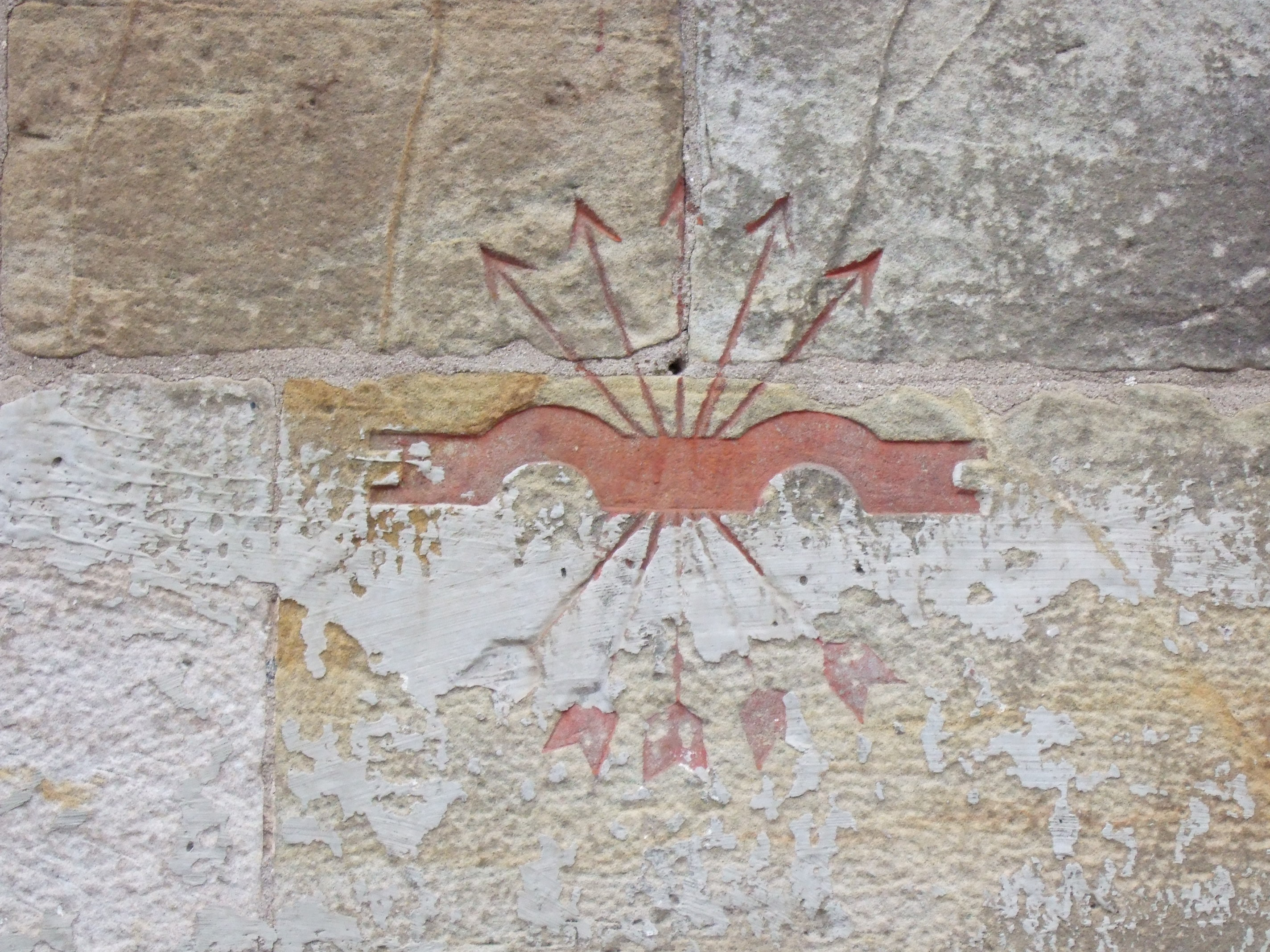 Reinosa - Iglesia de San Sebastián - Flechas y yugo en fachada